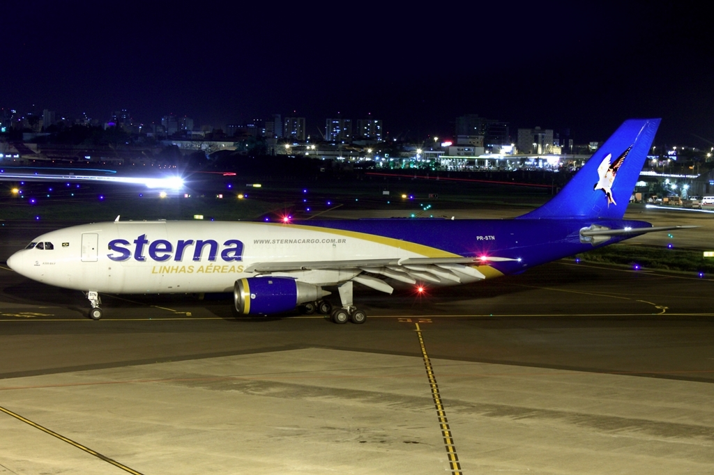 A300 STERNA SBPA